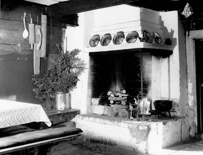 Interiör från Trädgårdstorp